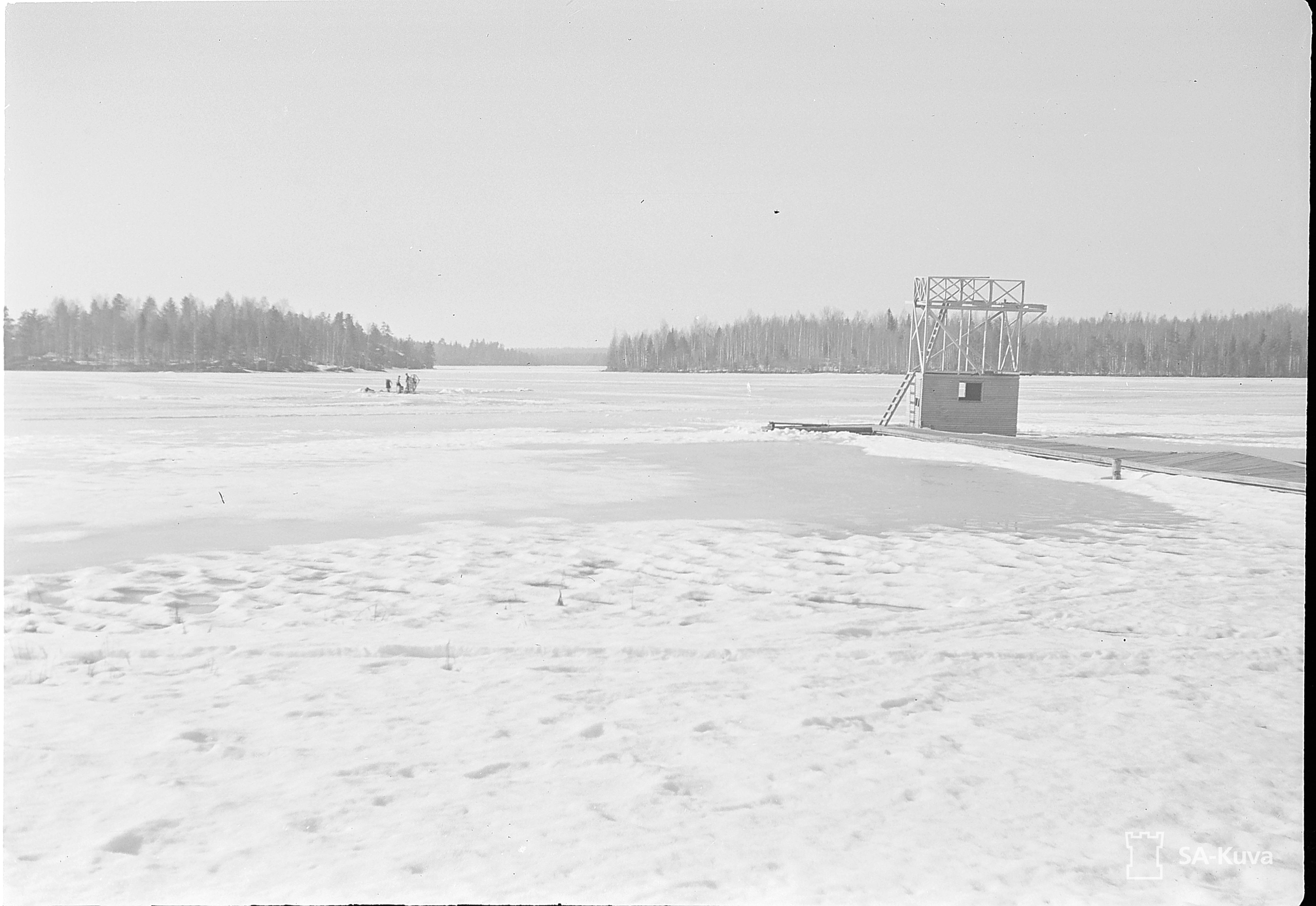 Kauniin Paikjrven jpinta on jo tummunut, mutta viel se kannattaa vaatteiden huuhtojat avannollaan.